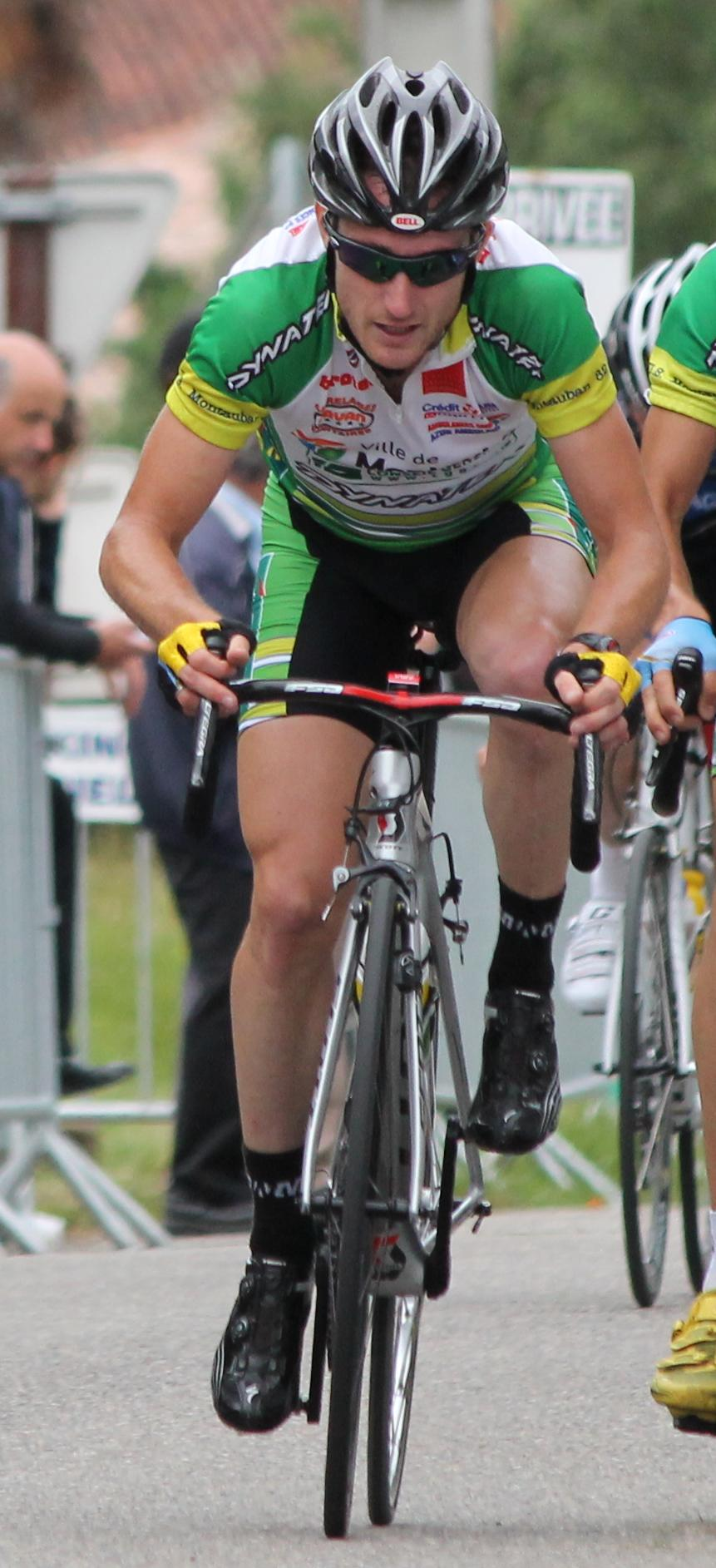 Mickaël Szkolnik à l'occasion des Championnats de Midi-Pyrénées 2012 sur route, disputés à Montauban sur le Circuit du Fau.